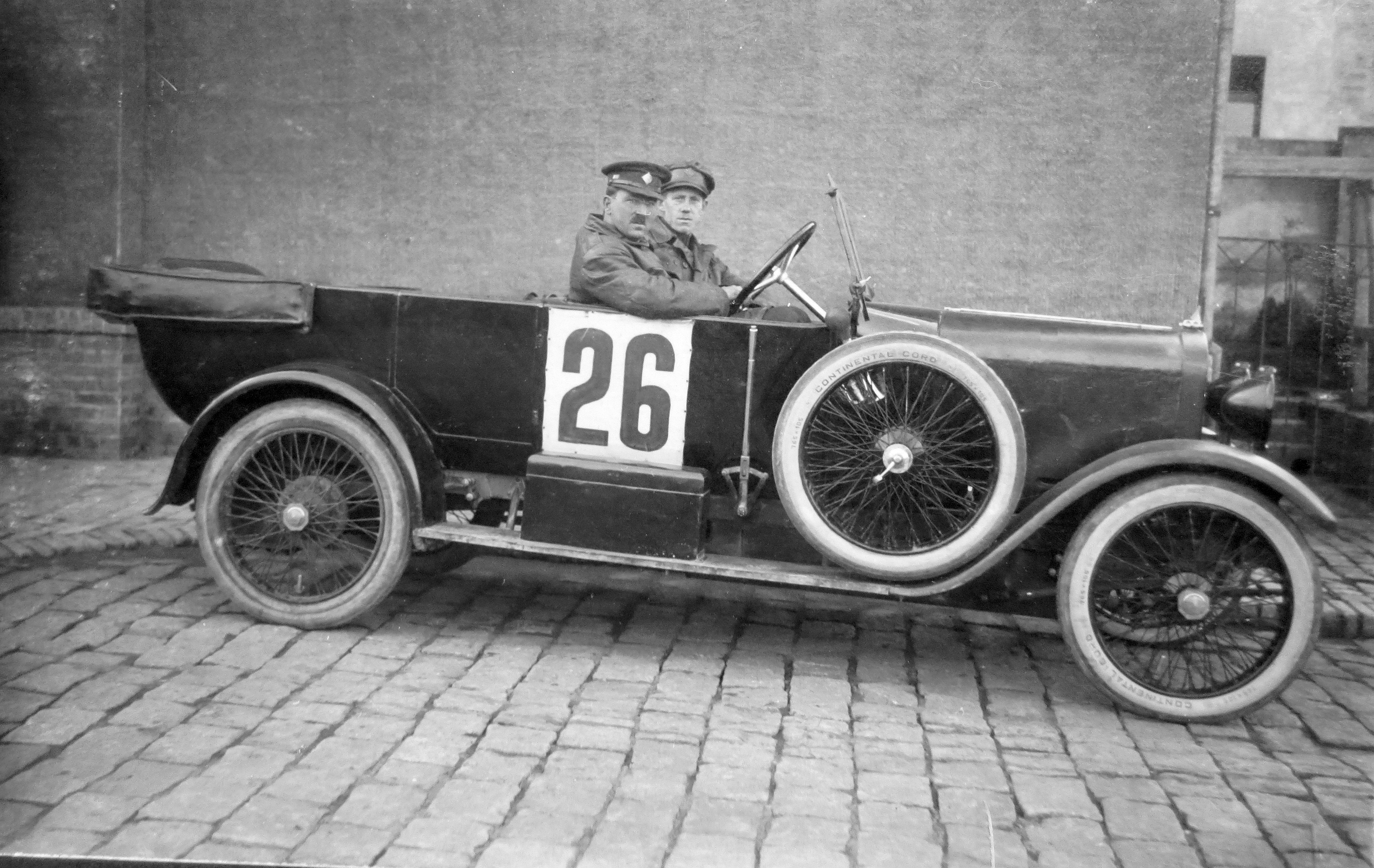 Walter WIZ, kpt. Böhm - rtm. Stošek v soutěžích Kolem republiky (1922-3)